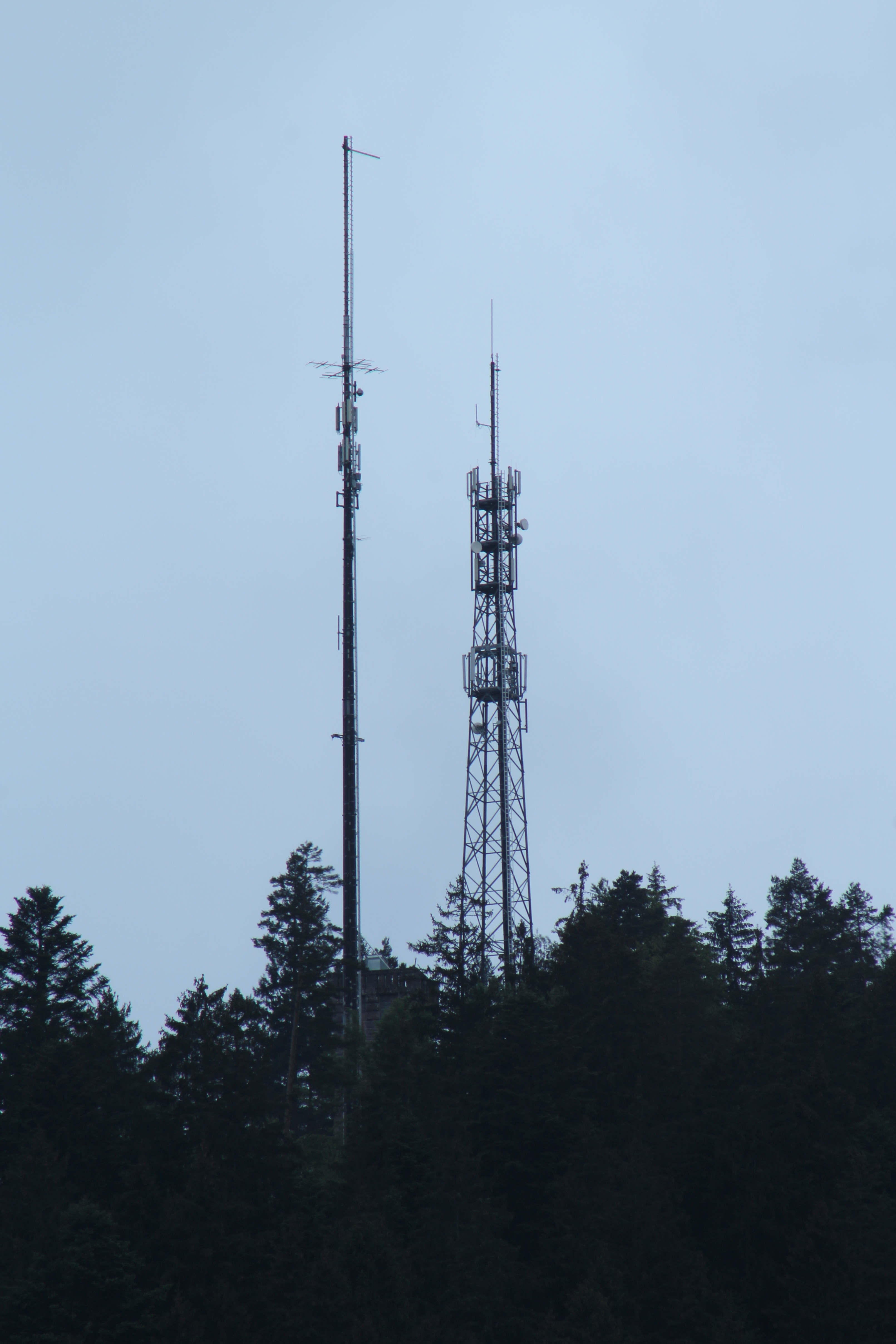 Sender Baiersbronn